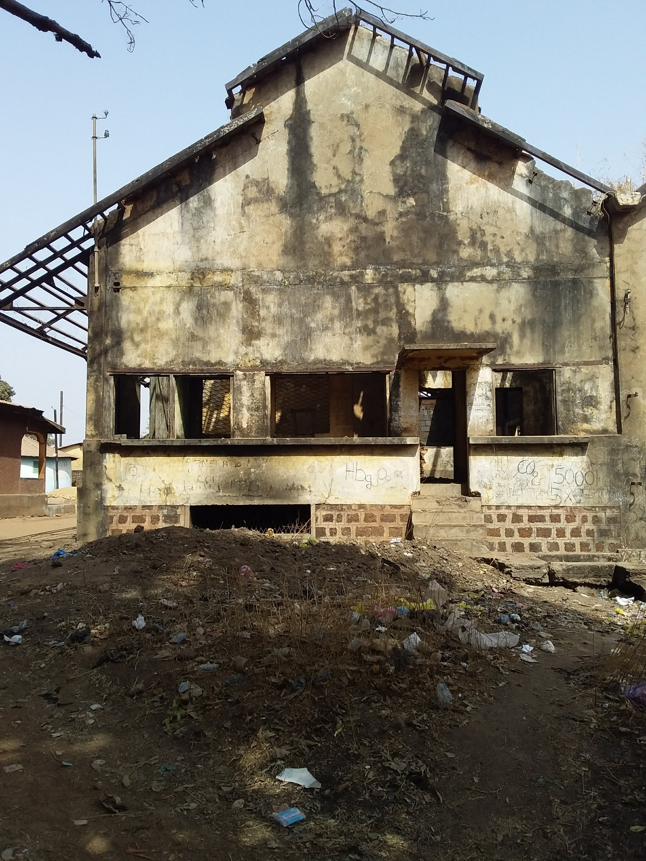 Kankan